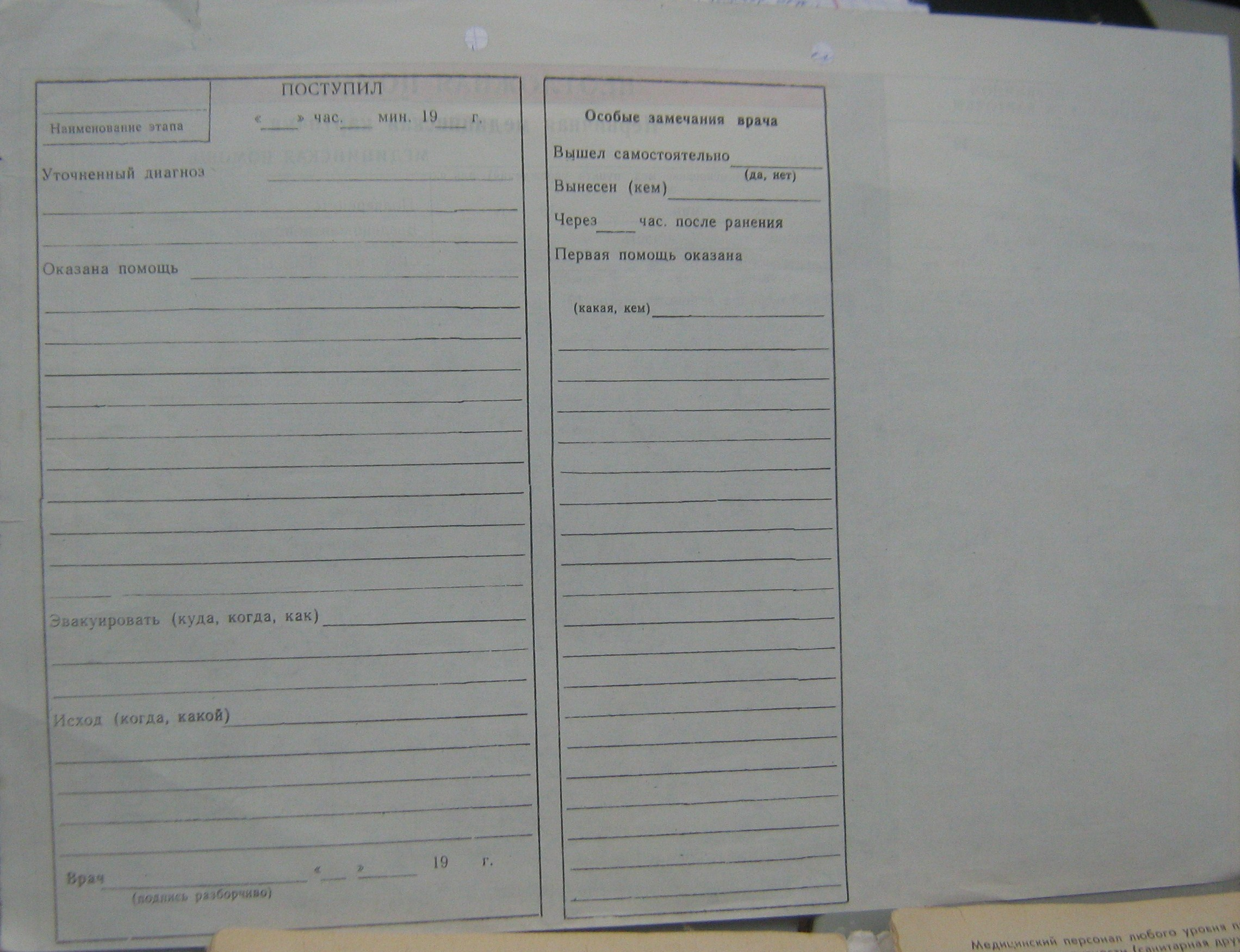 Изображена первичная медицинская карточка, точнее её оборотная сторона